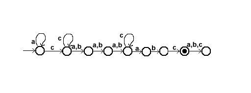 Graaf bij de reguliere taal a*c+(a|b)3c*abc. Ter illustratie bij het artikel Eindige toestandsautomaat. d.d. 24-07-2005 BenTels